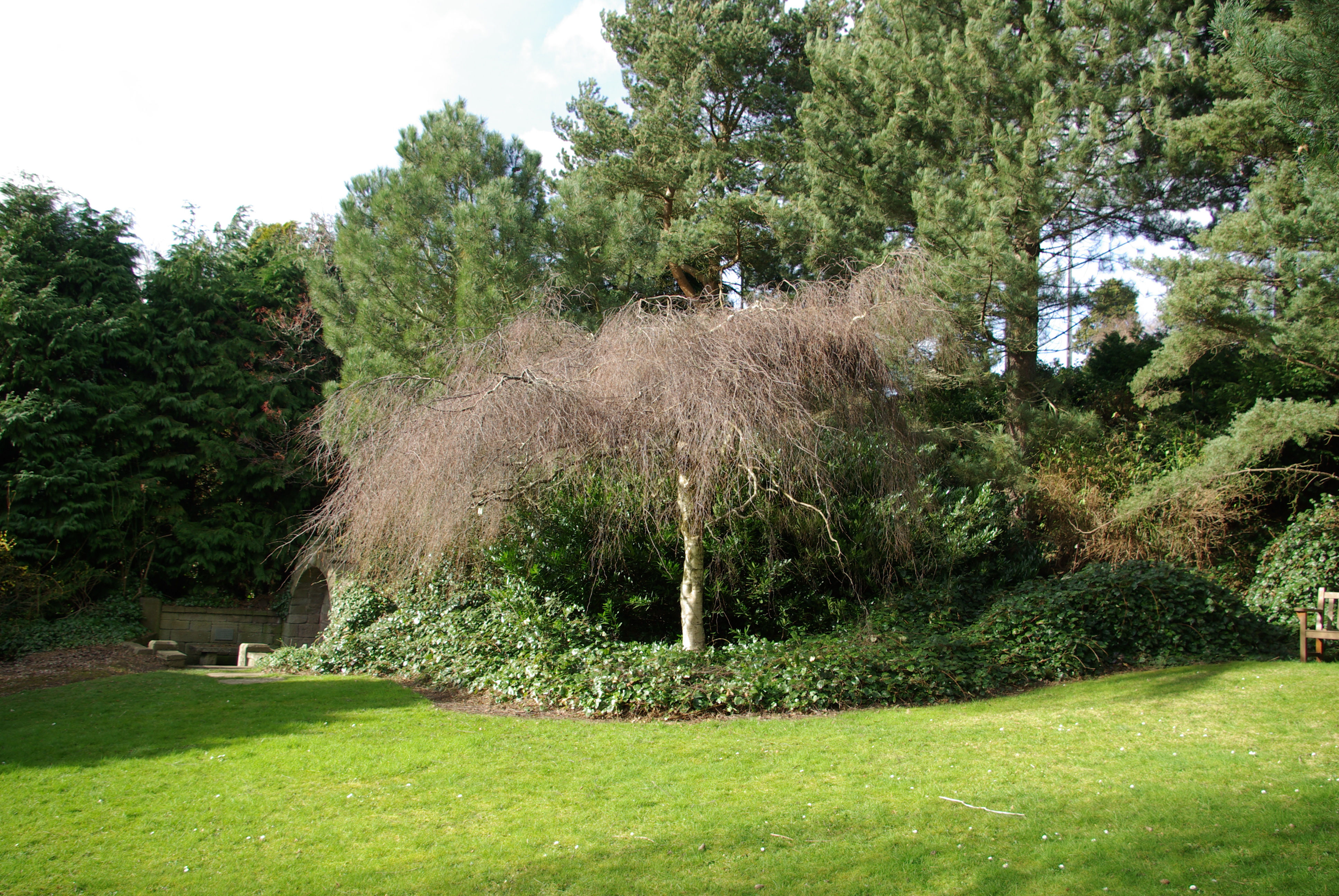 Betula pendula 'Youngii'